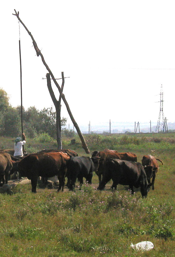 Steppenbrunnen bei Wessela Dolyna (Tarutyne)